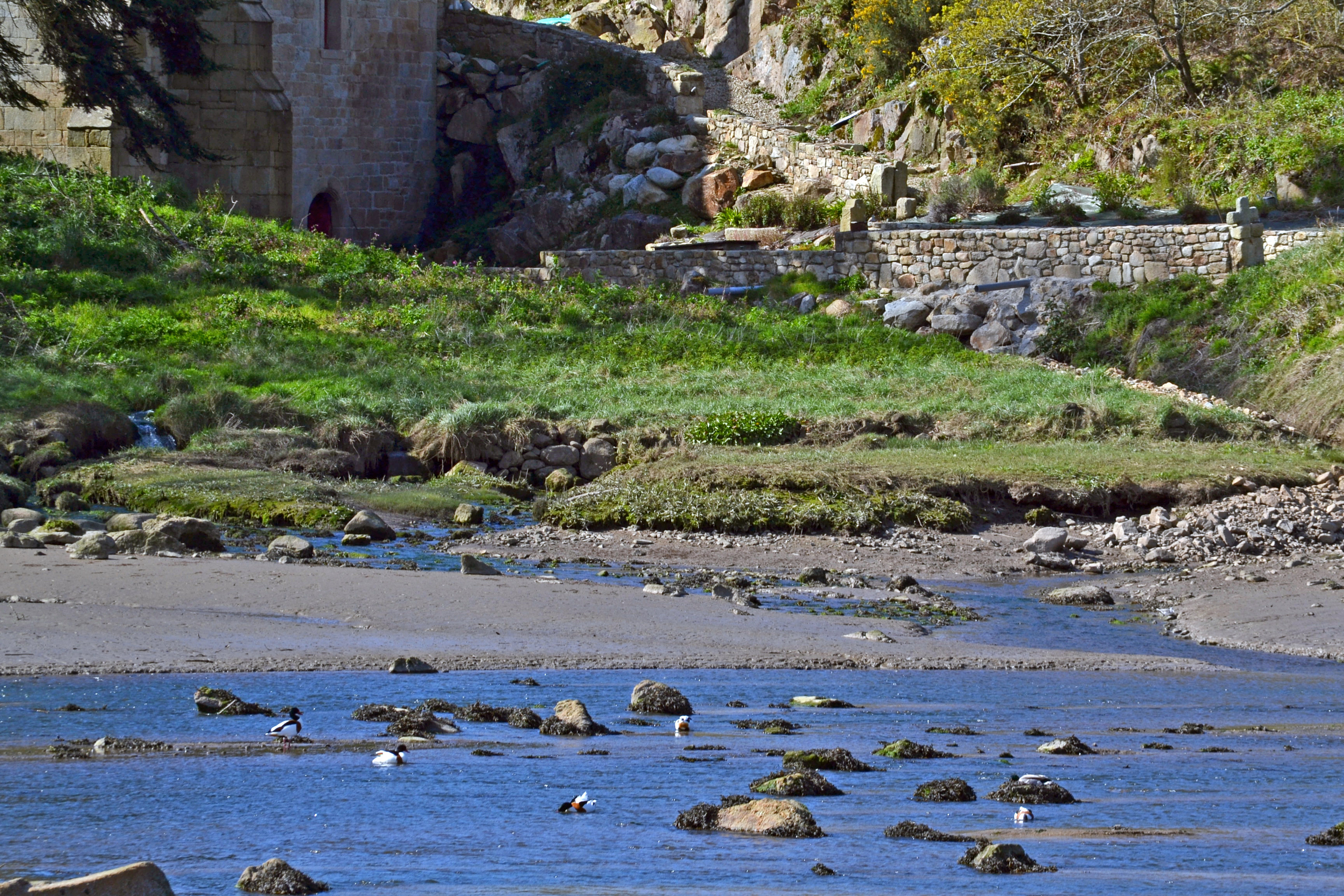 Estuaire de la rivière du Guillec traversant Plougoulm (Finistère).